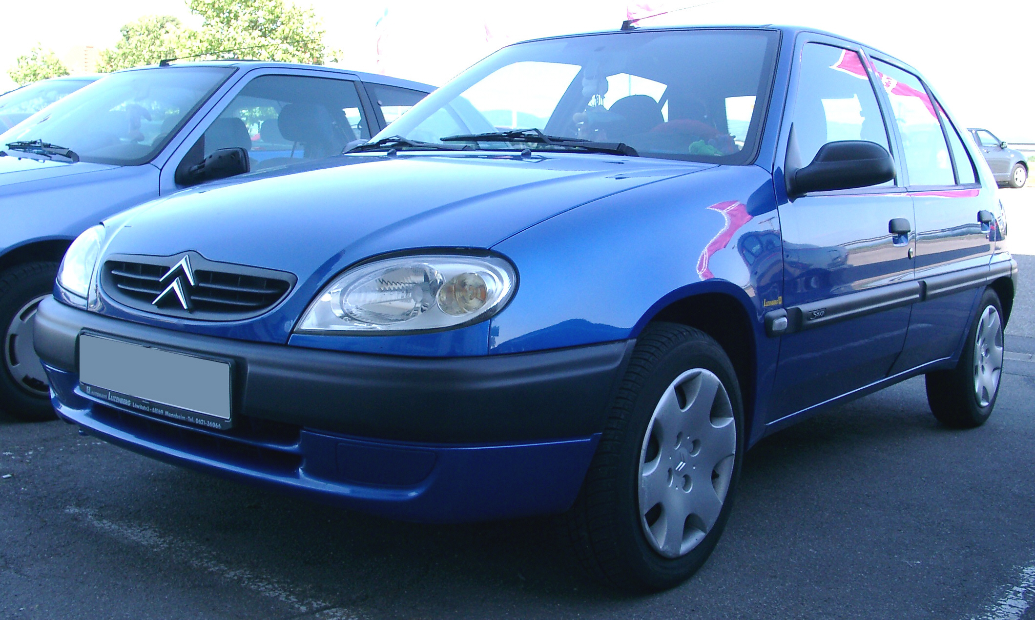 Citroën Saxo